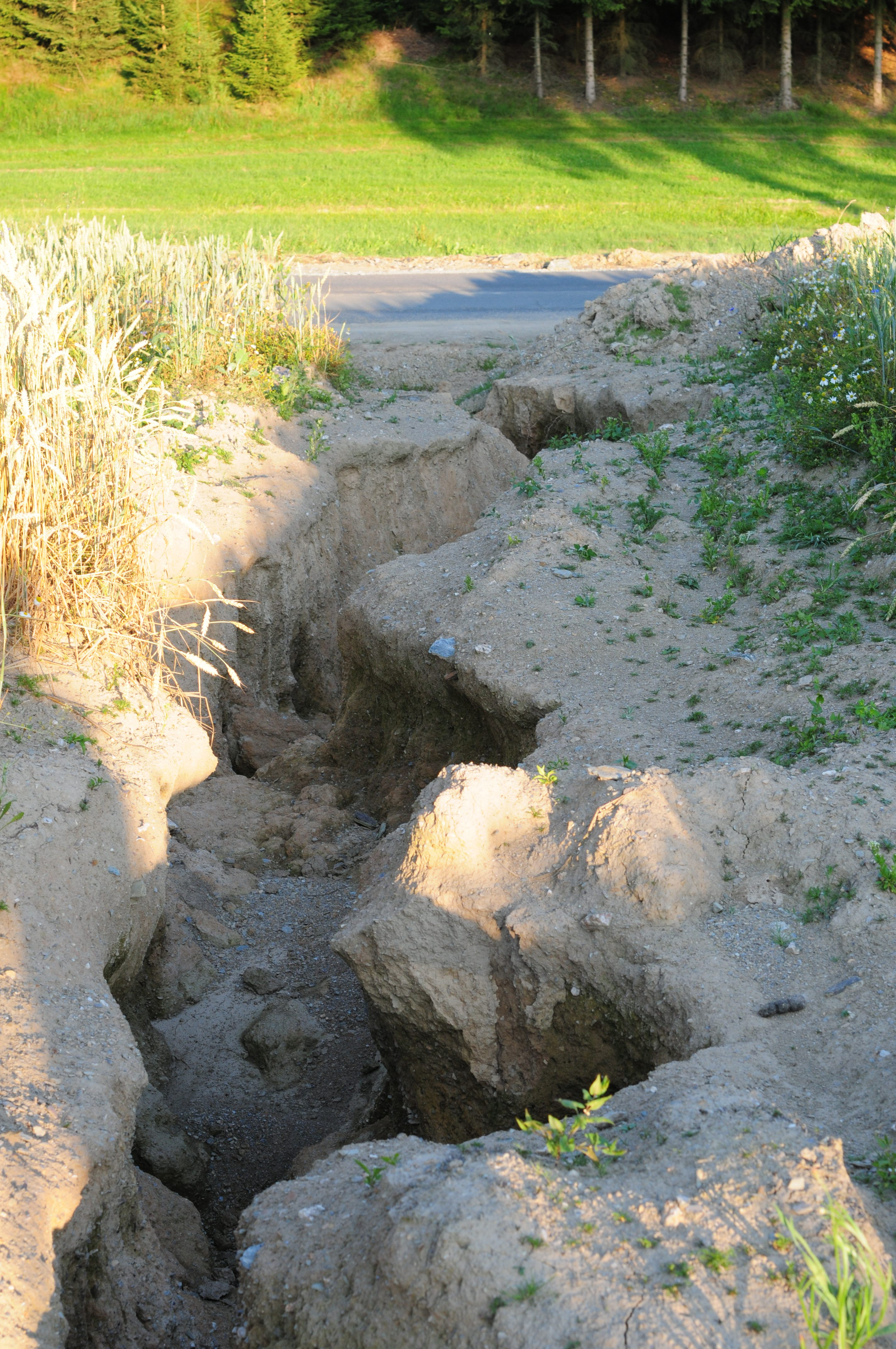 Erosionsrinne in einem Getreidefeld nach einem Starkregen (Sachsen, Deutschland)